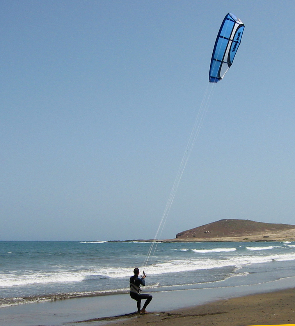 Playa de El Médano. Controlando una cometa. Según el viento, la usan para jugar con ella desde tierra o en el mar, con una tabla de surf. Algunos usan unos carritos con ruedas, de esto no hay fotos.